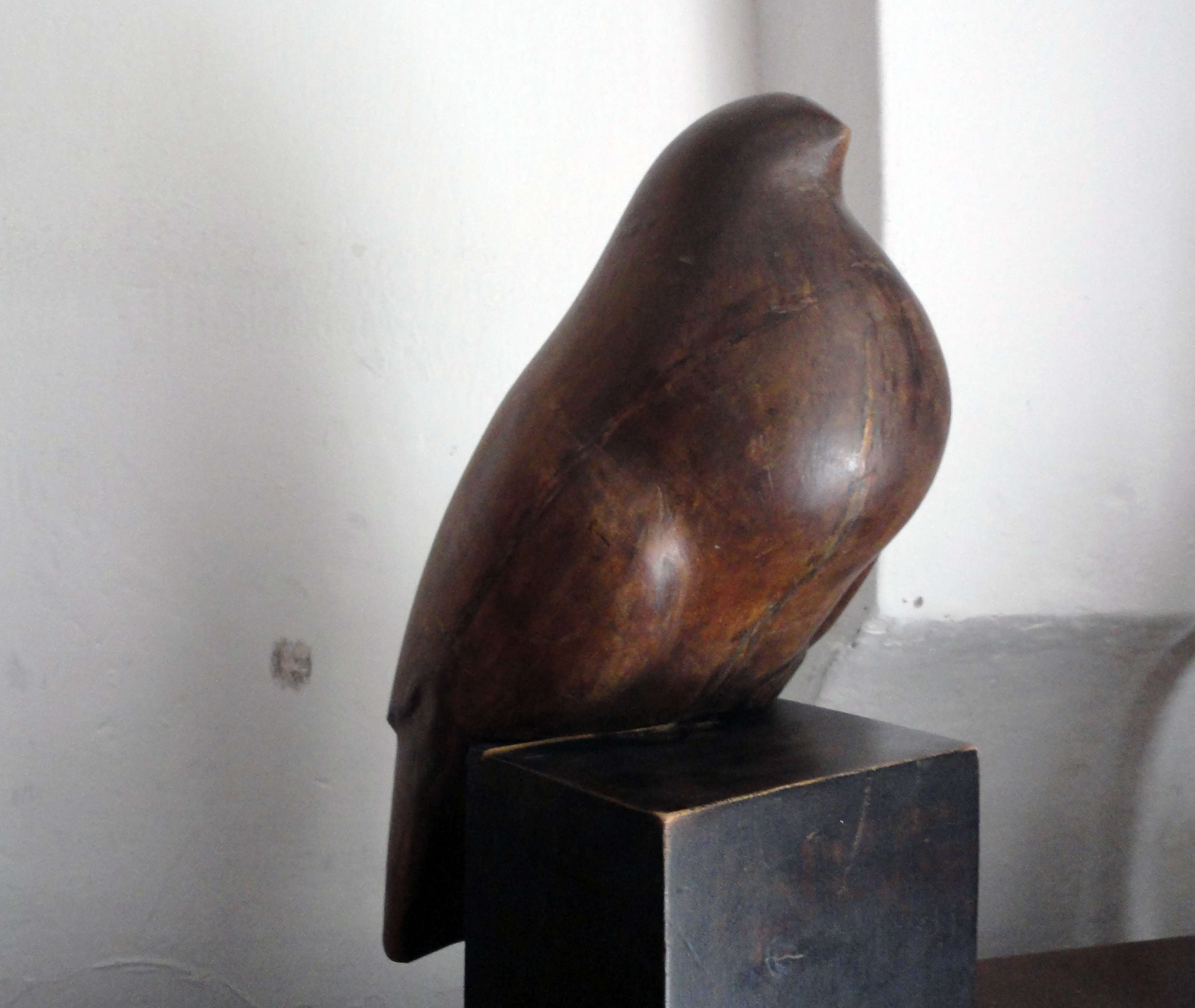 בית טיכו הוא אחד הבתים הראשונים בירושלים שנבנו מחוץ לחומות העיר העתיקה. הבית שימש למגוריהם ועבודתם של האומנית אנה טיכו ובעלה הרופא החוקר אברהם אלברט טיכו. כיום המקום משמש כמוזיאון המנציח את פועלם.